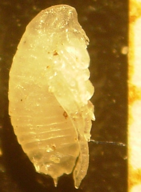 Jeune nymphe de la puce du chat et du chien (téguments clairs).